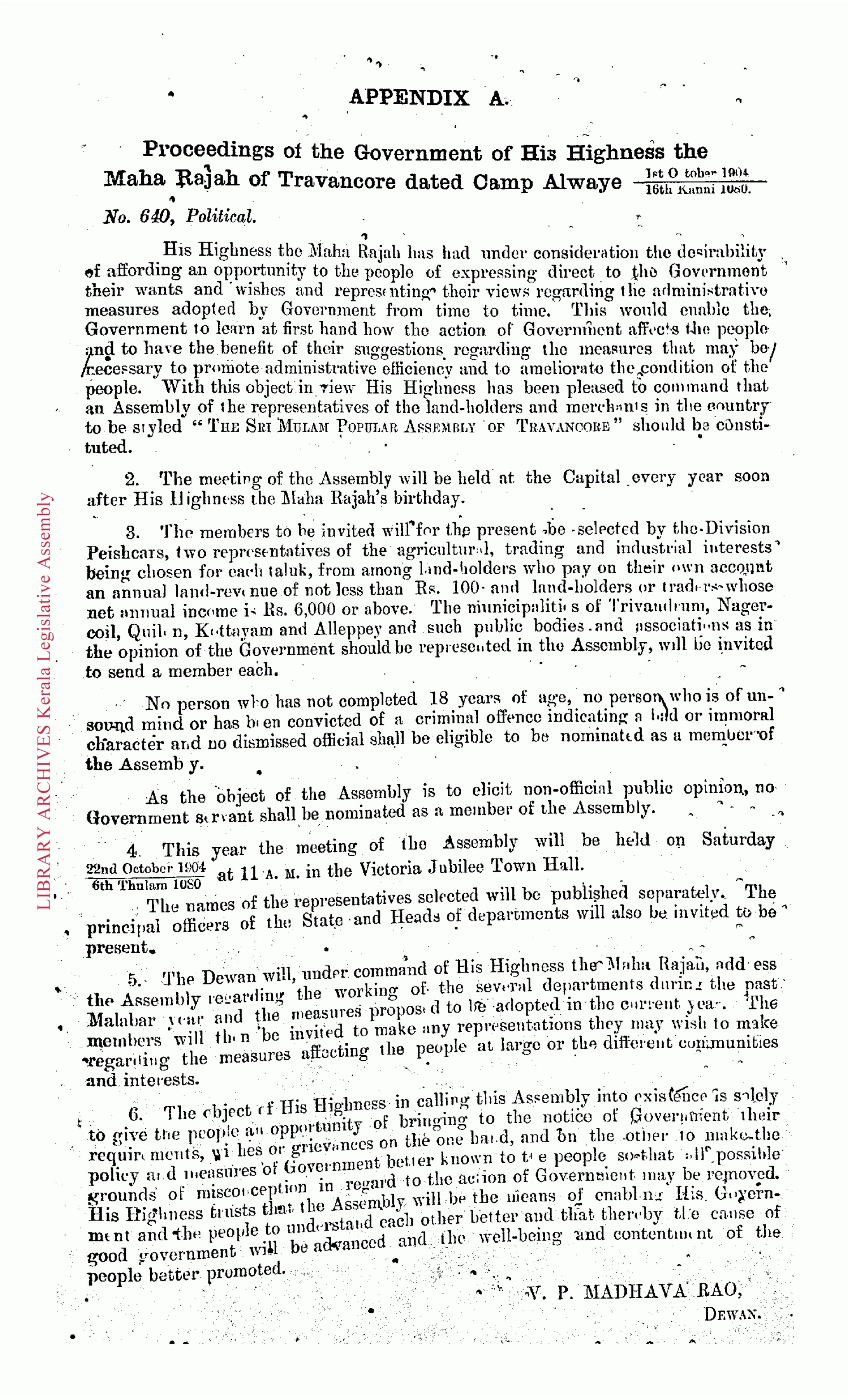 ശ്രീ മൂലം പ്രജാസഭയുടെ സ്ഥാപനത്തിനായി ദിവാൻ 1904 ഒക്റ്റോബർ 1-ന് പുറത്തിറക്കിയ ഉത്തരവ്